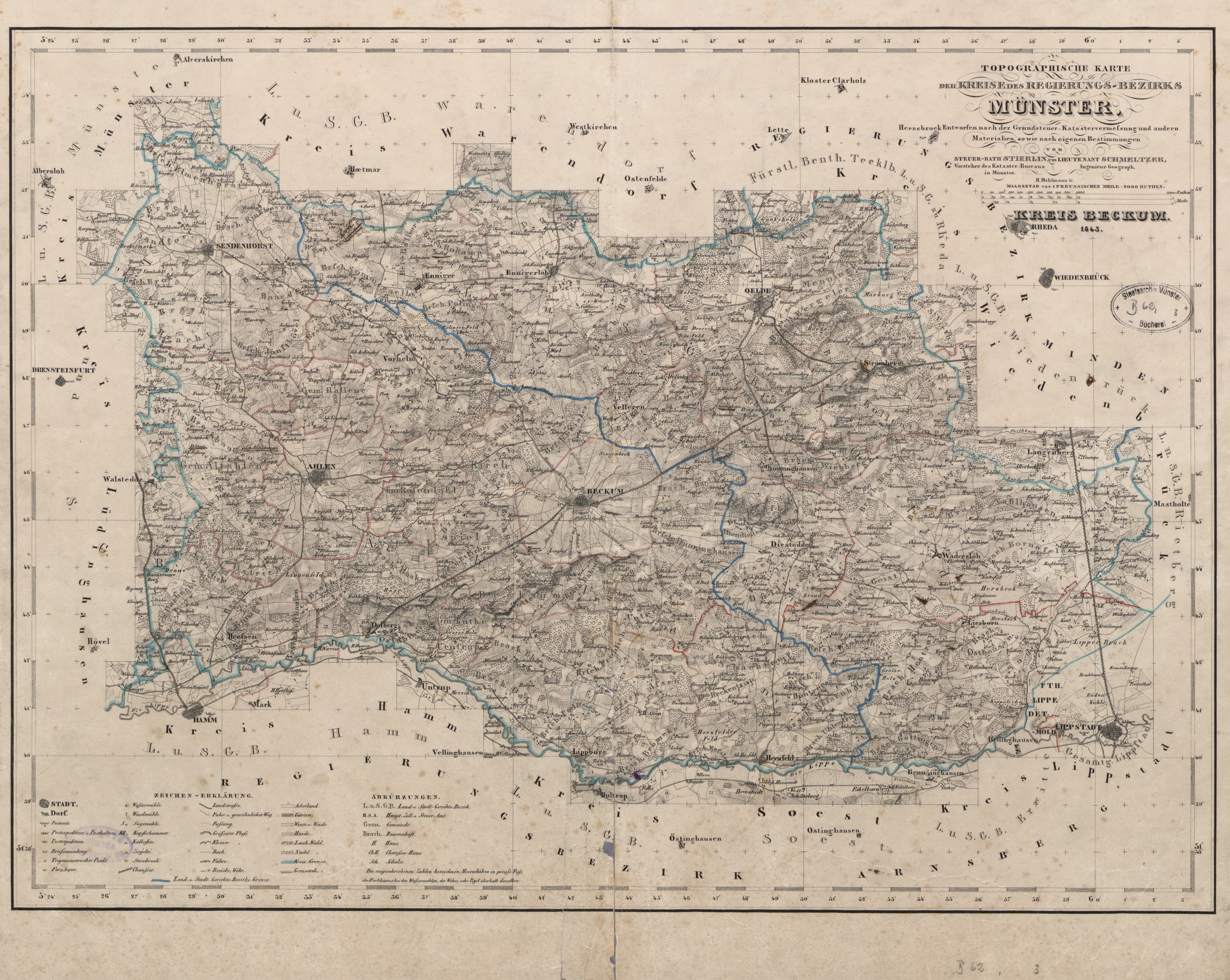 Topographische Karte der Kreise des Regierungs-Bezirks Münster, Blatt 10: Kreis Beckum, 1843